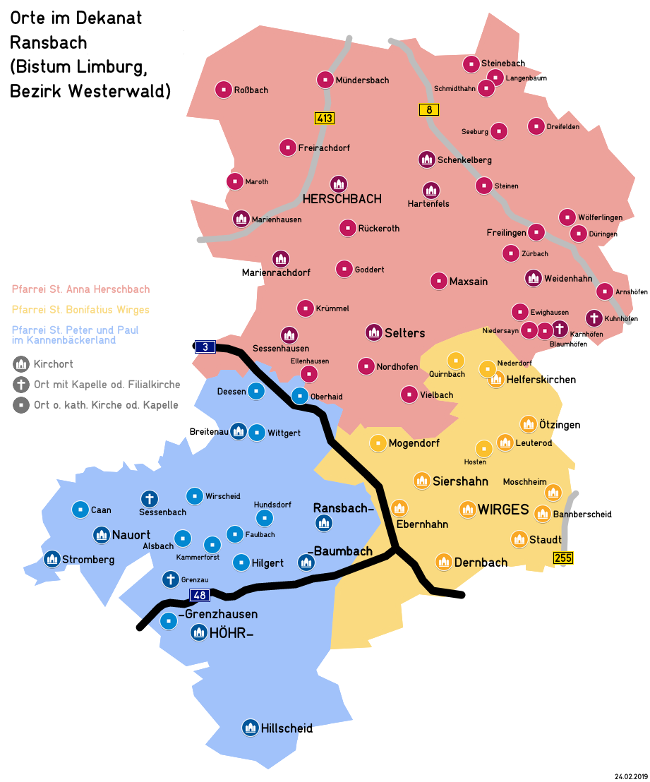 Karte mit allen Orten innerhalb des Dekanats Ransbach (Bistum Limburg, Bezirk Westerwald) im Jahr 2019